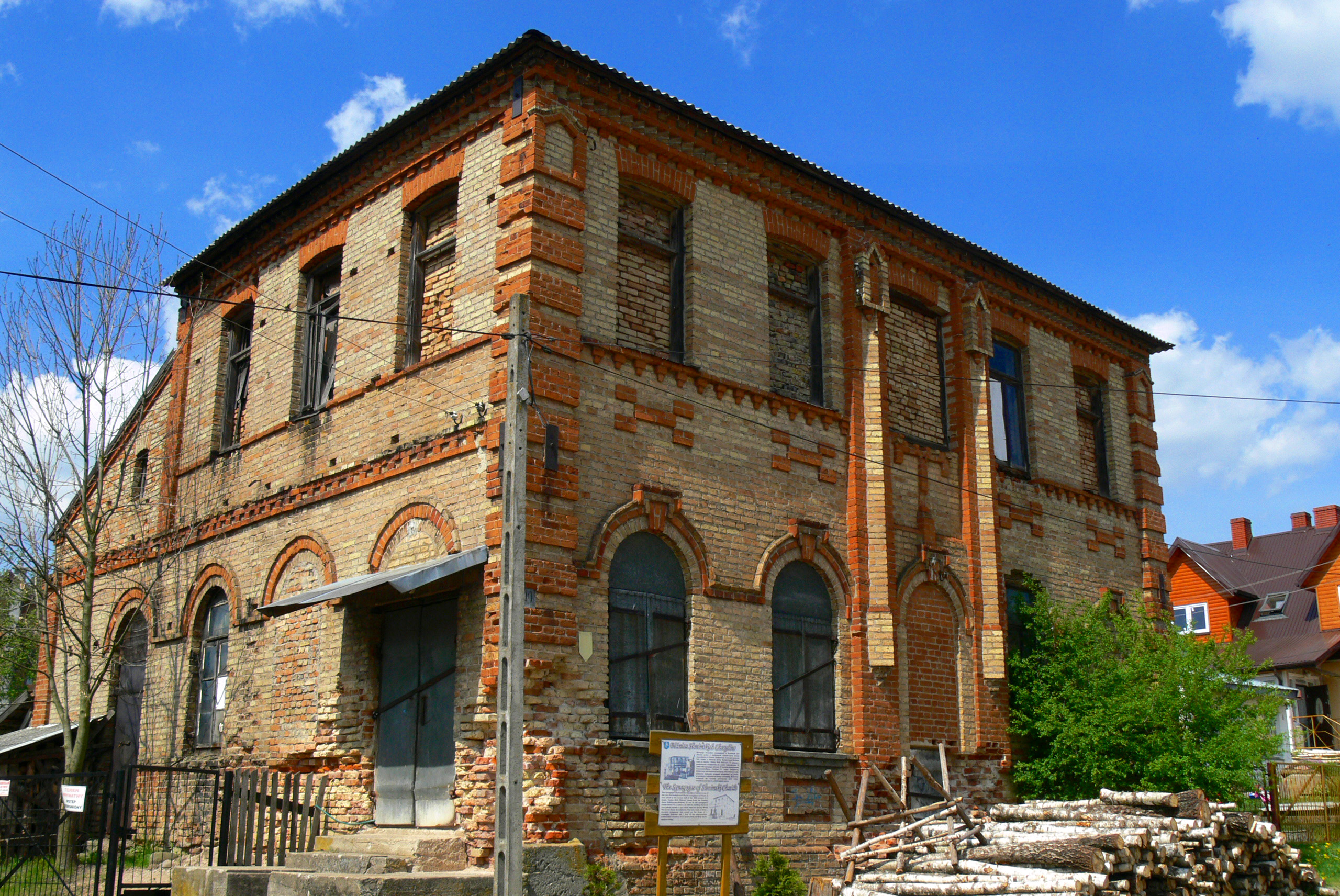 Krynki, bóżnica, ob. magazyn, 2 poł. XIX